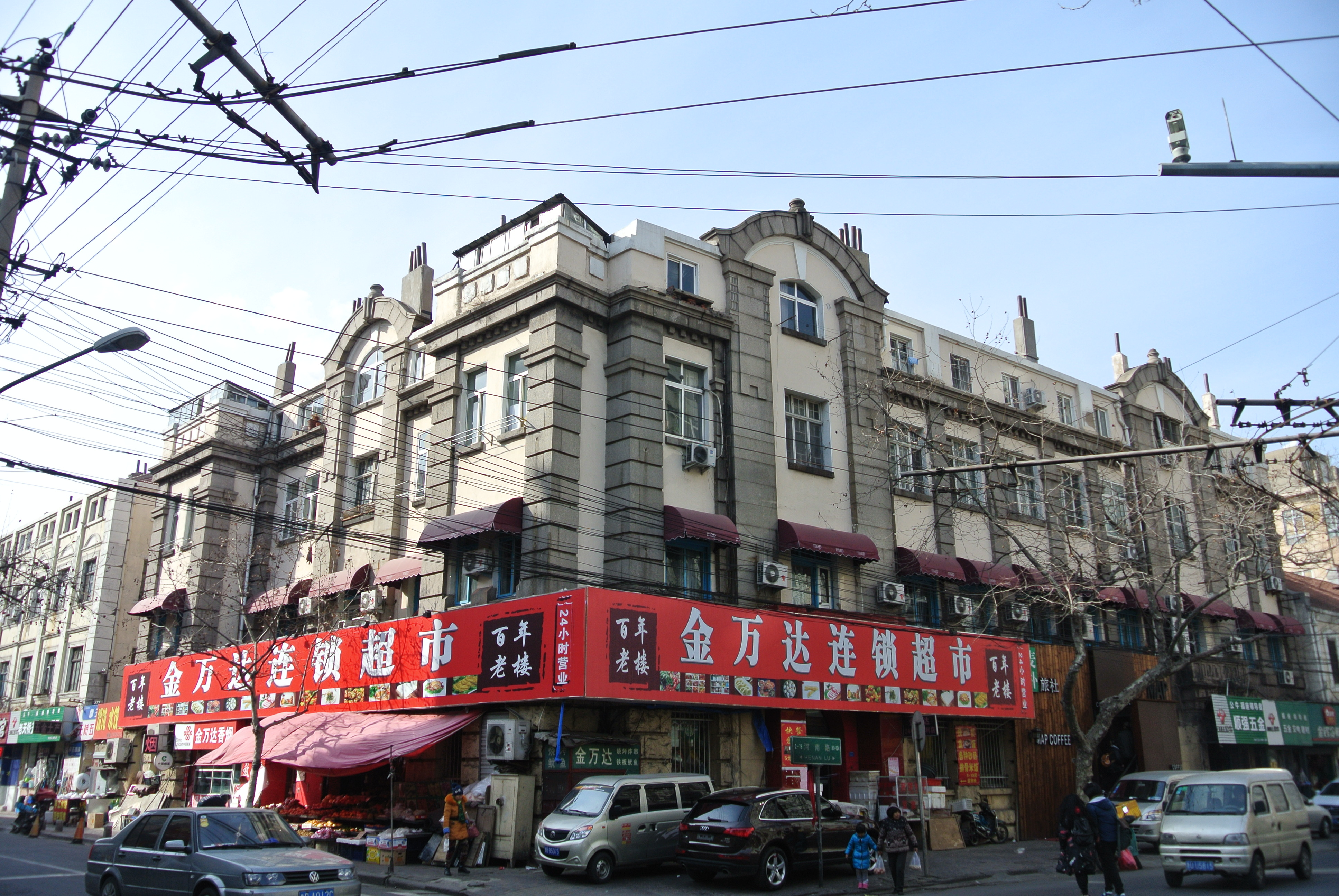 青岛天津路东莱银行大楼旧址